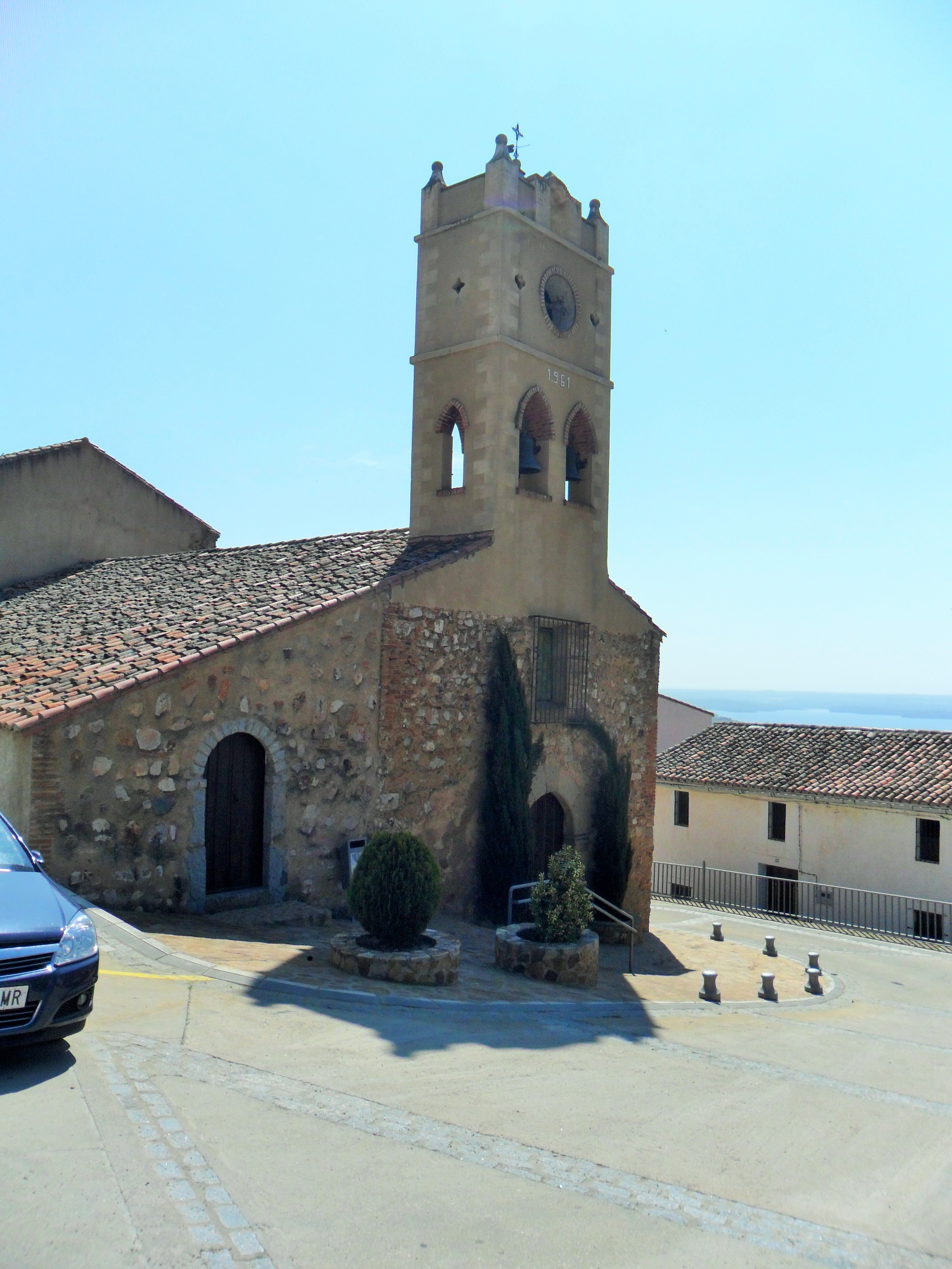 Iglesia parroquial del Espíritu Santo